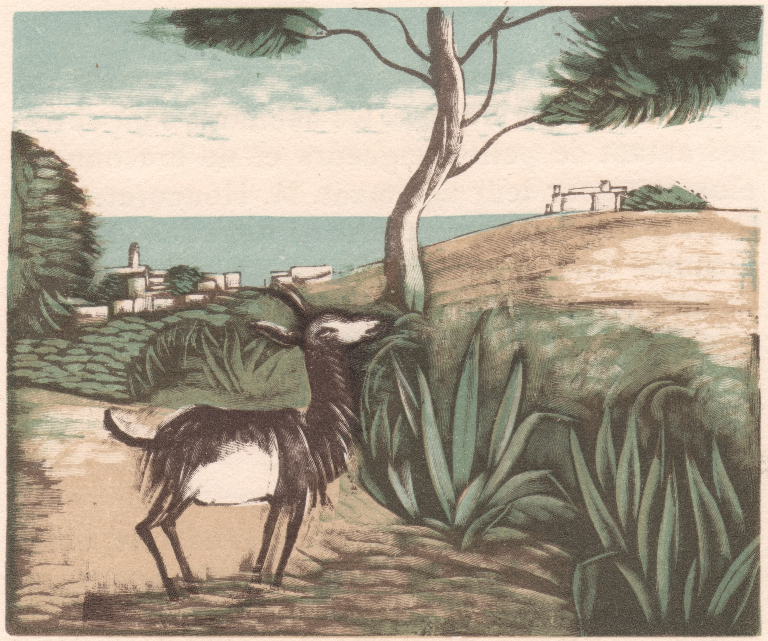 Illustration p 201 de La chèvre d'or de Paul Arène, compositions en couleur de Siméon, édition d'art Manuel Brucker, Paris.